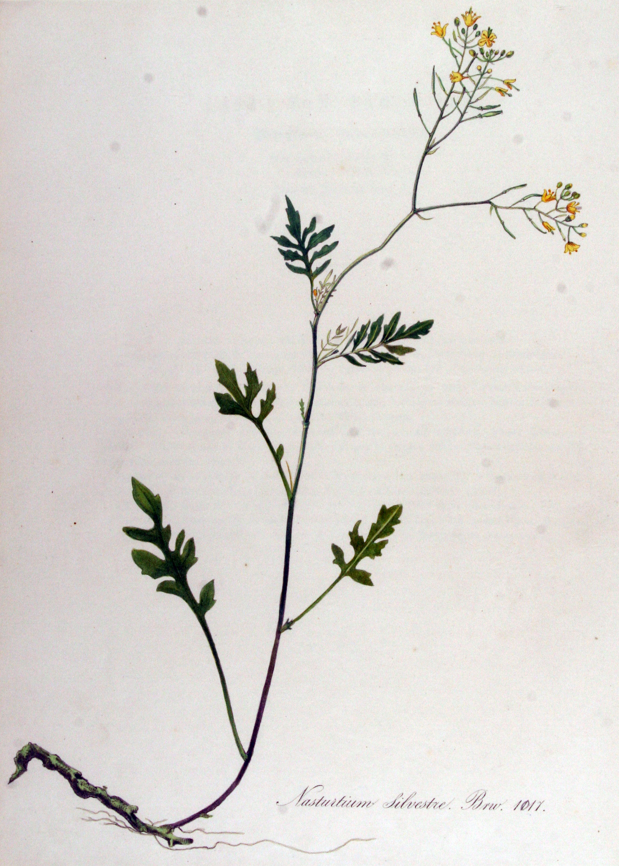 Rorippa sylvestris (L.) Besser (Syn. Nasturtium sylvestre (L.) R. Brown)